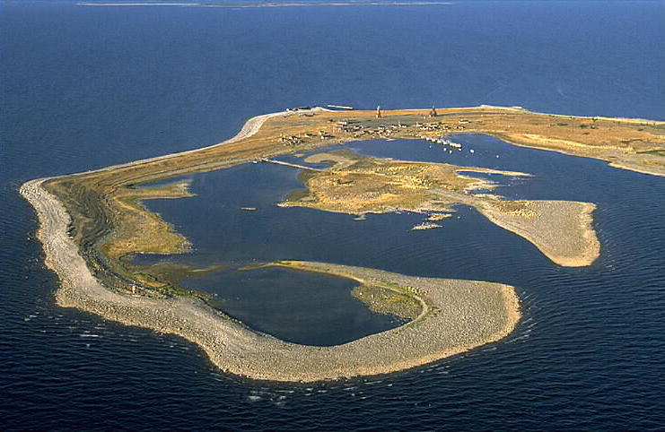 Motiv: Malören Nyckelord: Byggnadsminnen:Statl, Flygbilder, Naturreservat, Riksintressen Kategori: Flygplats, Fiskeläge Malören